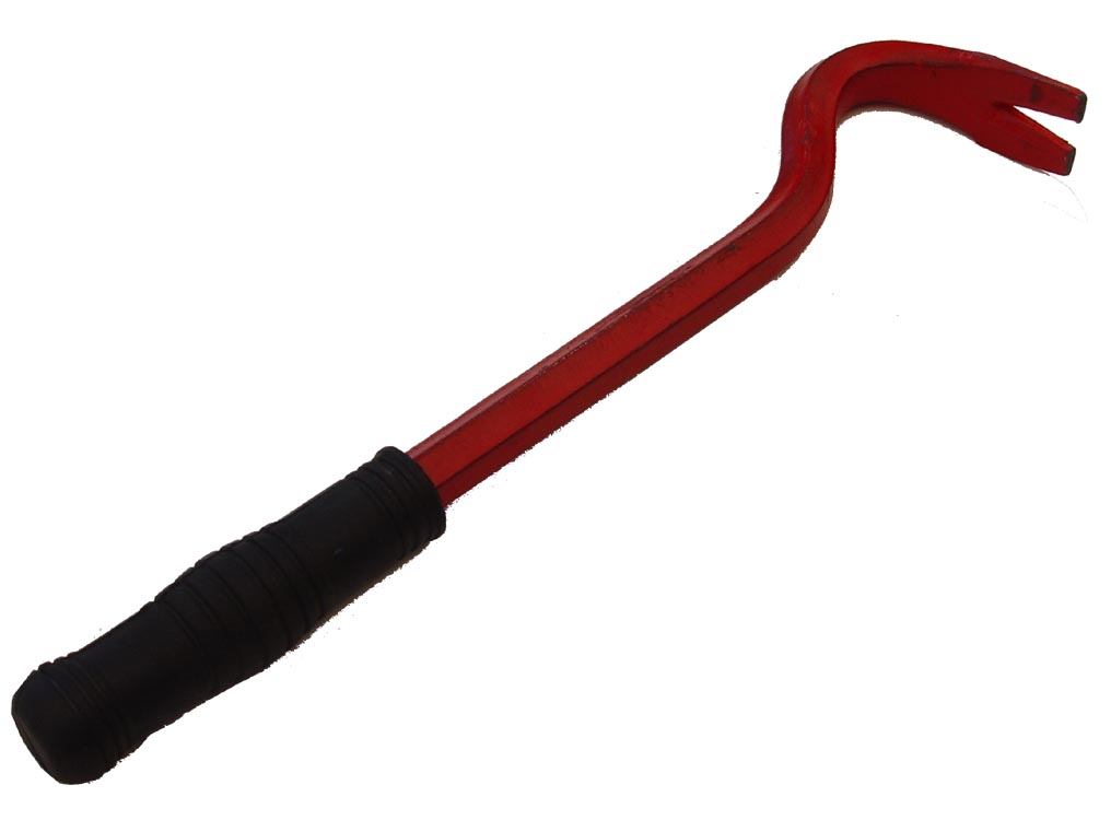 Brecheisen